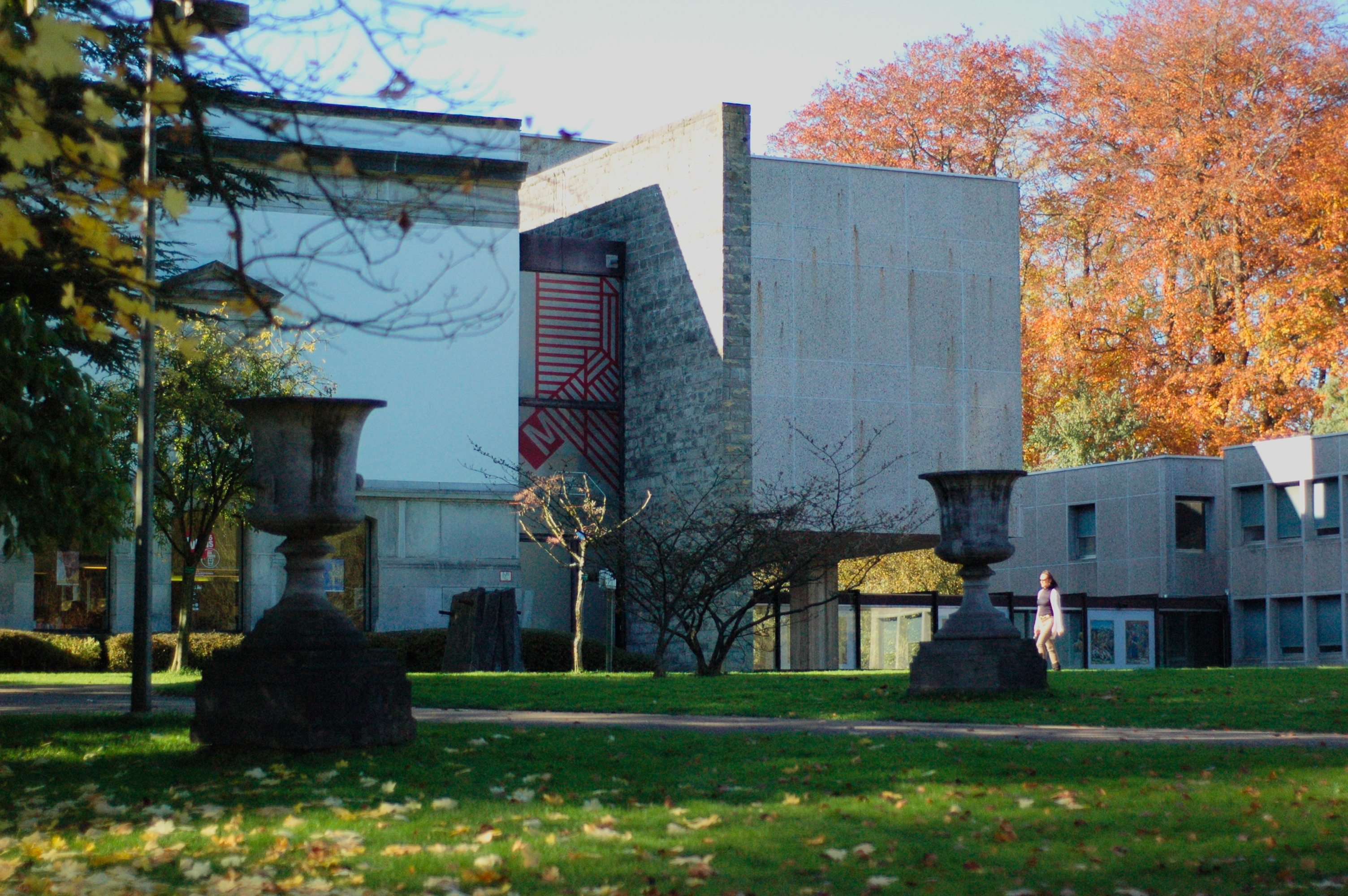 Une photographie du Musée royal de Mariemont.